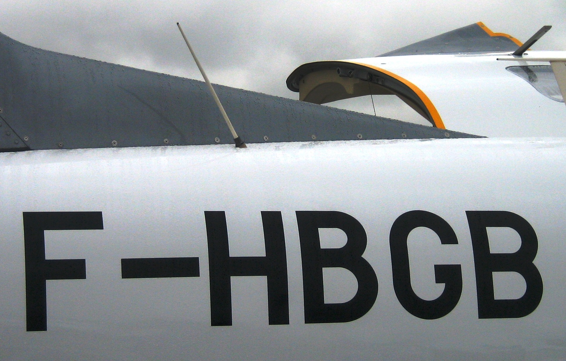 indicatif radio de l'aéronef français F-HBGB et antenne VHF 118 à 137 MHz Photograph taken at: Paris Air Show, 20 June 2011–26 June 2011